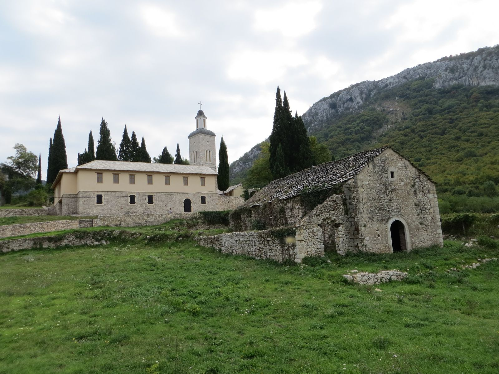 Manastir Žitomislići